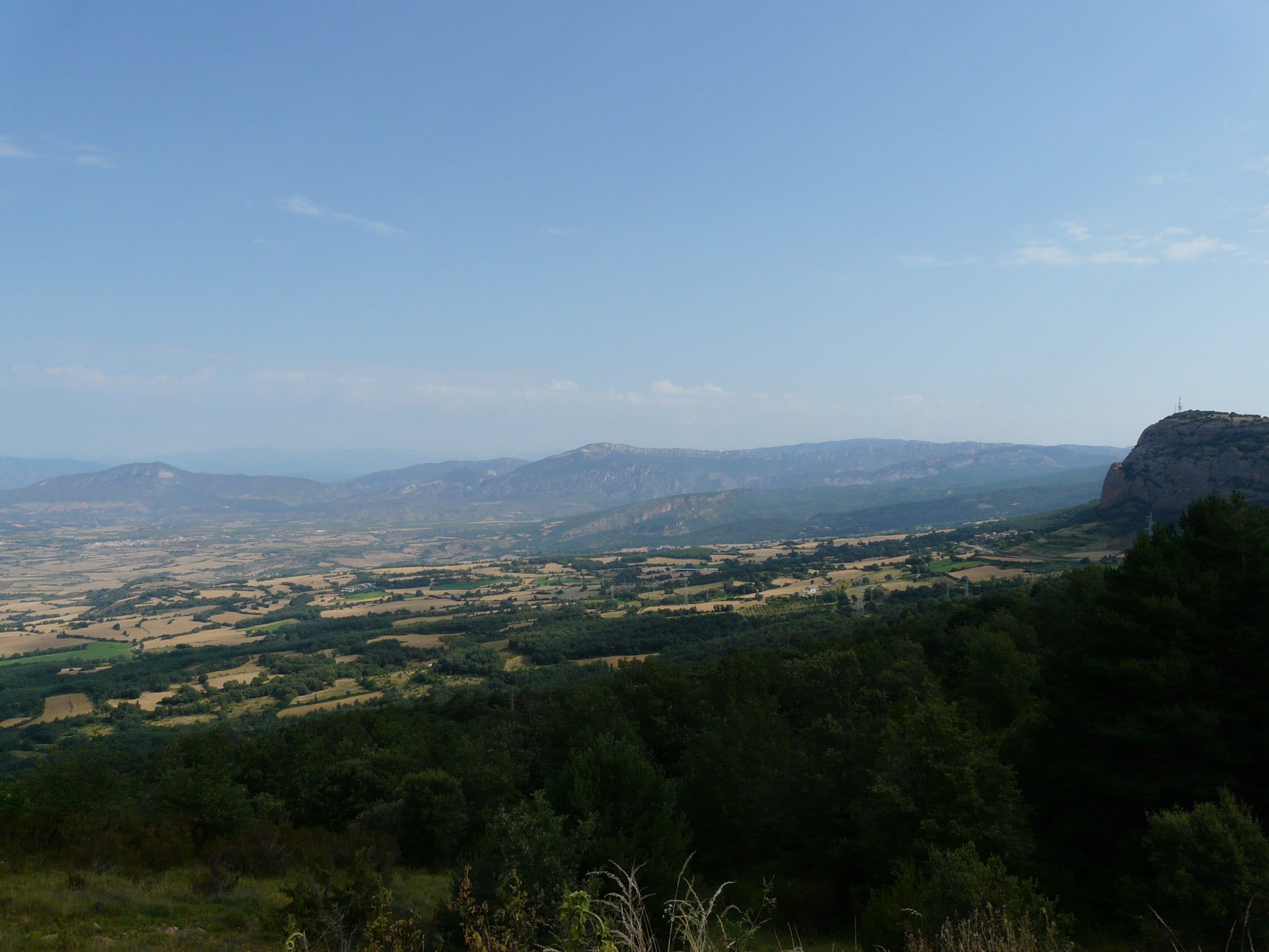 Vista parcial de la Conca de Tremp des del coll de Comiols